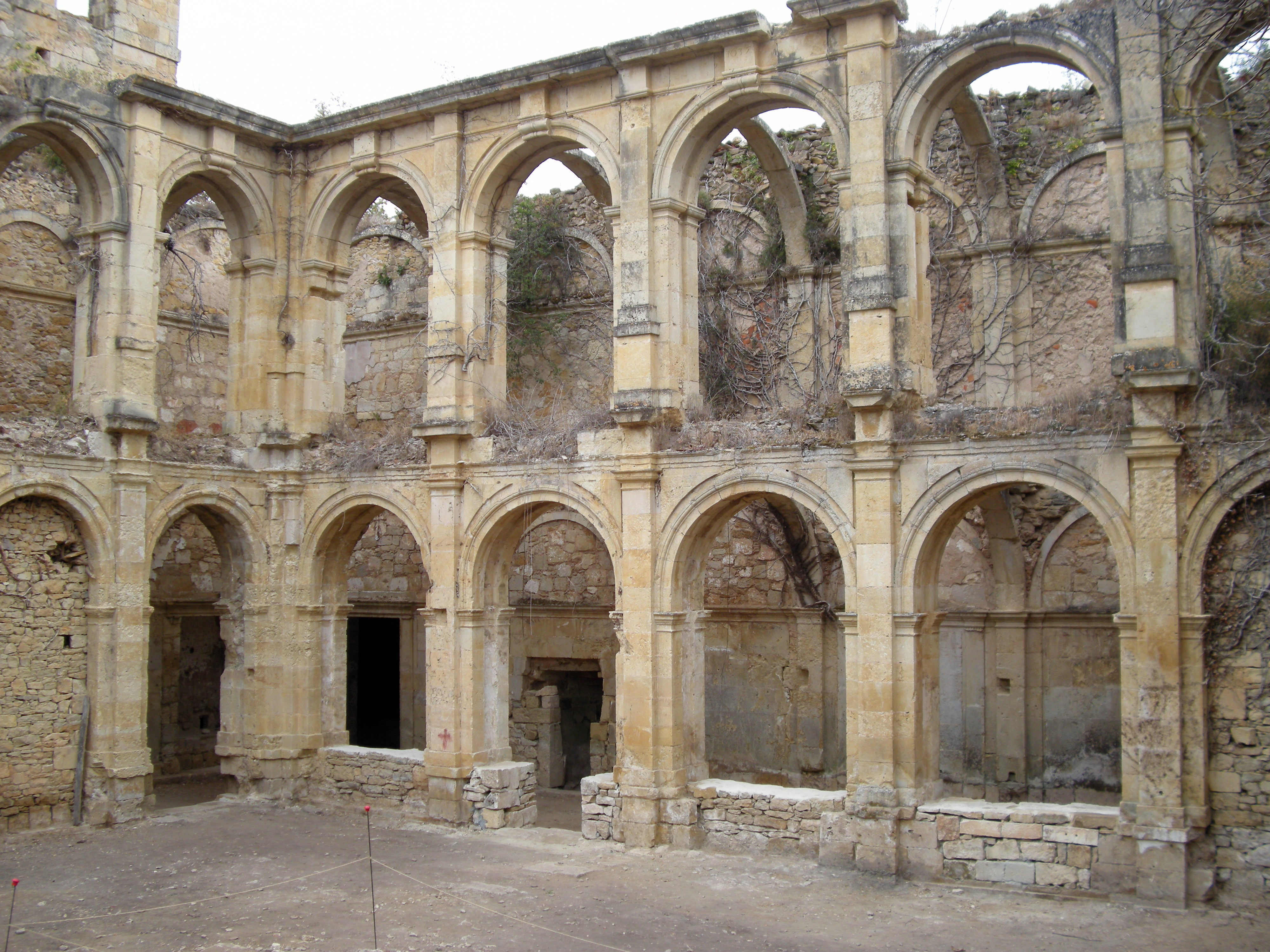 Parte del claustro del Monasterio Santa María de Rioseco tras la semana del voluntariado de 2012. Situado junto al pueblo de Rioseco en el Valle de Manzanedo, Burgos.